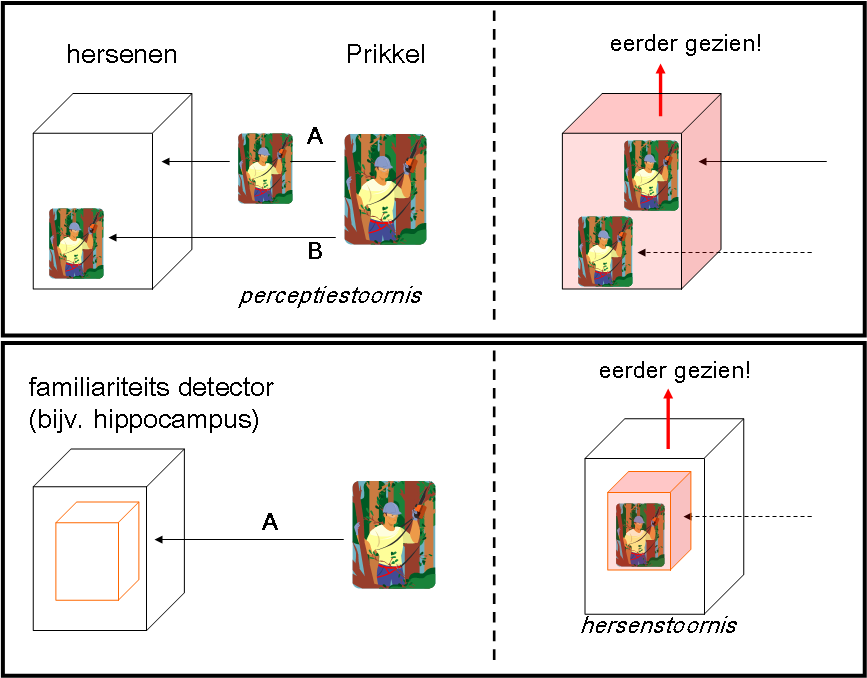 deja vu